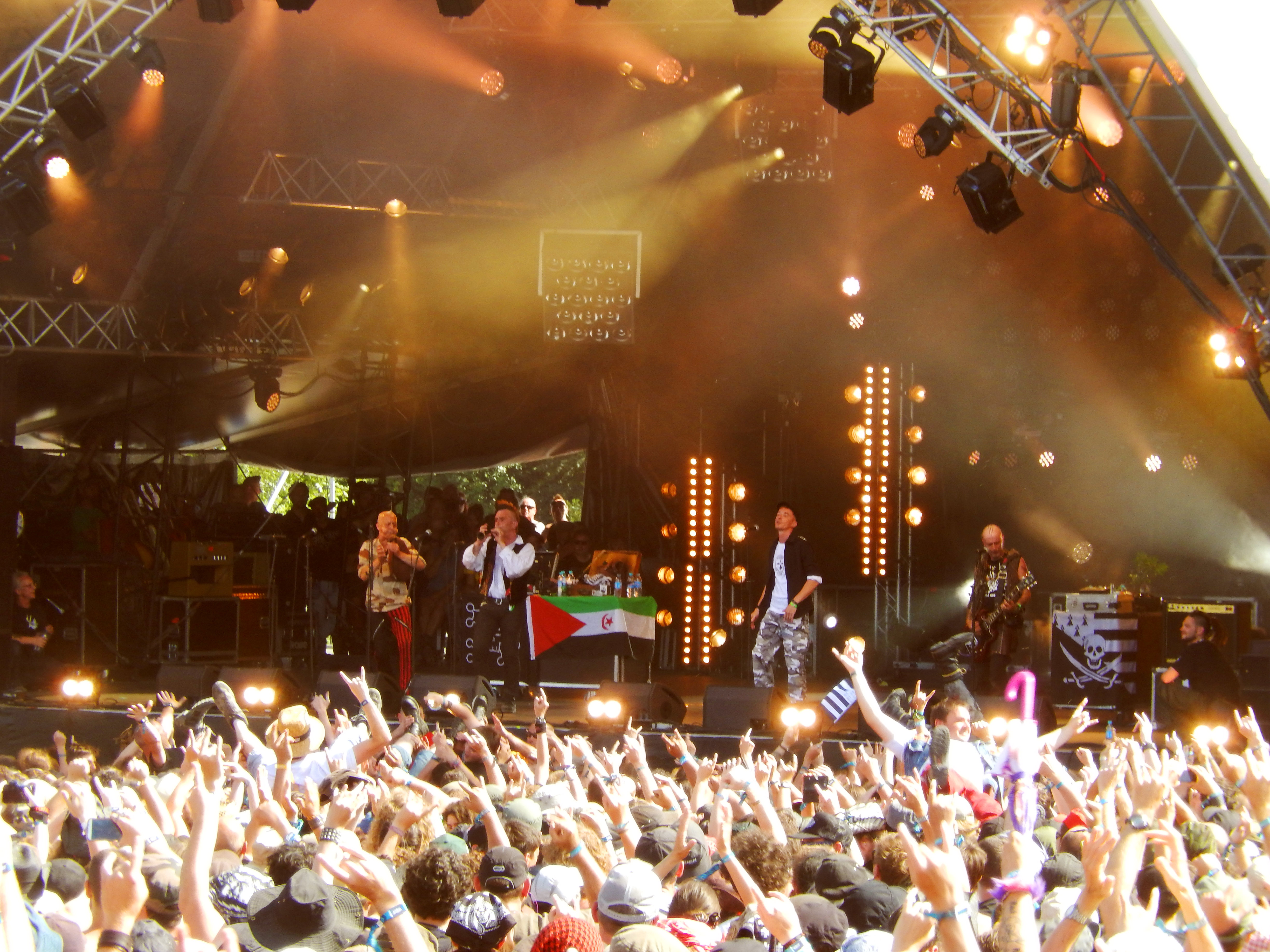 Les Ramoneurs de menhirs au Hellfest 2015